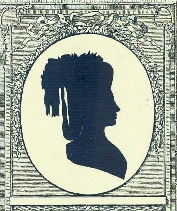 Варвара Ивановна Кошелева, ур. Плещеева (1756—1809)